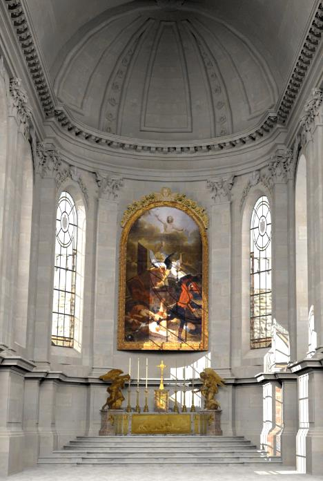 Restitution 3D de l'intérieur de la chapelle de Meudon.